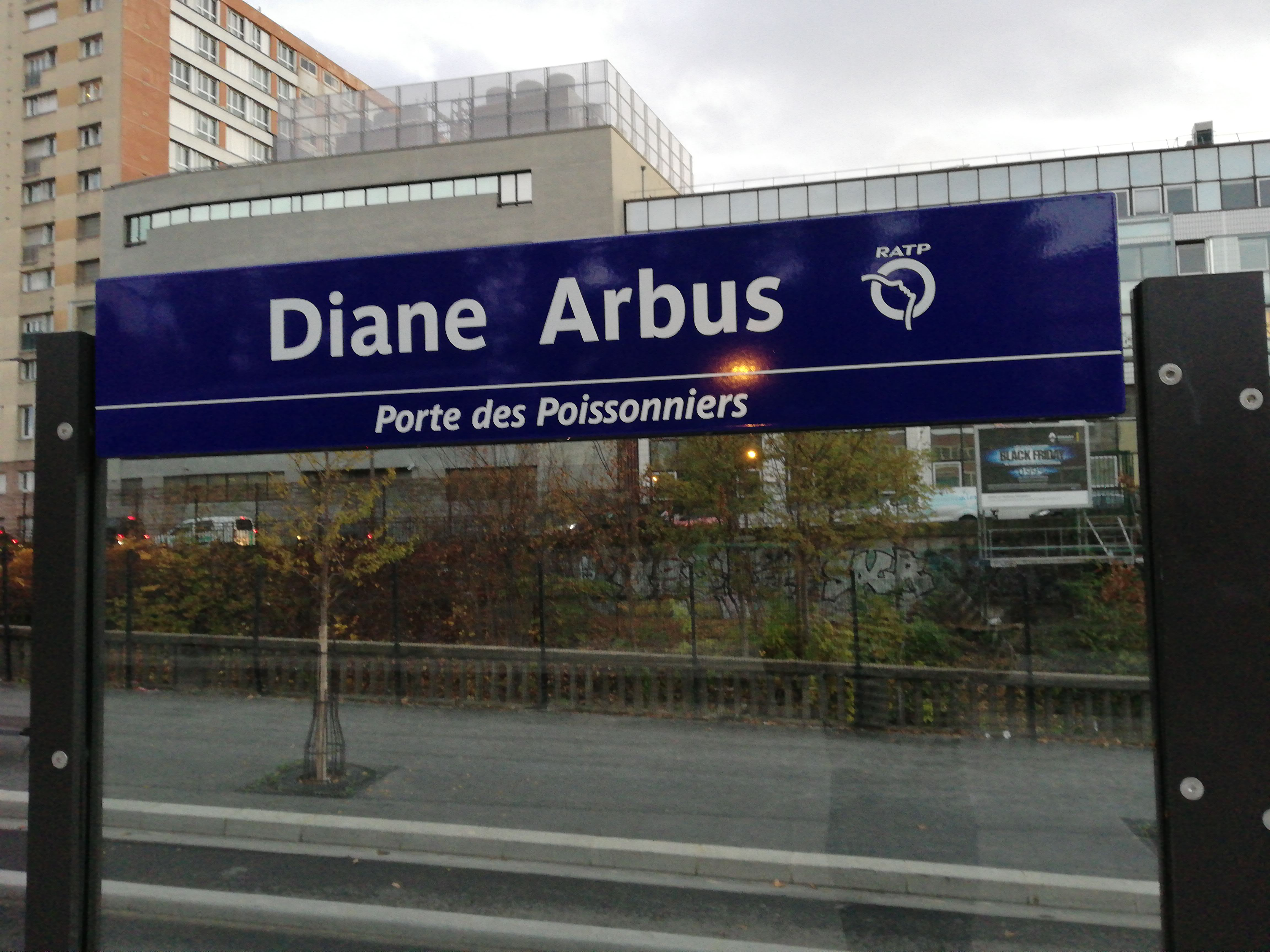 Plaque signalétique de la station Diane Arbus - Porte des Poissonniers de la ligne 3b du tramway d'Île-de-France, le jour de l'ouverture du prolongement de la ligne de Porte de la Chapelle à Porte d'Asnières, en 2018.